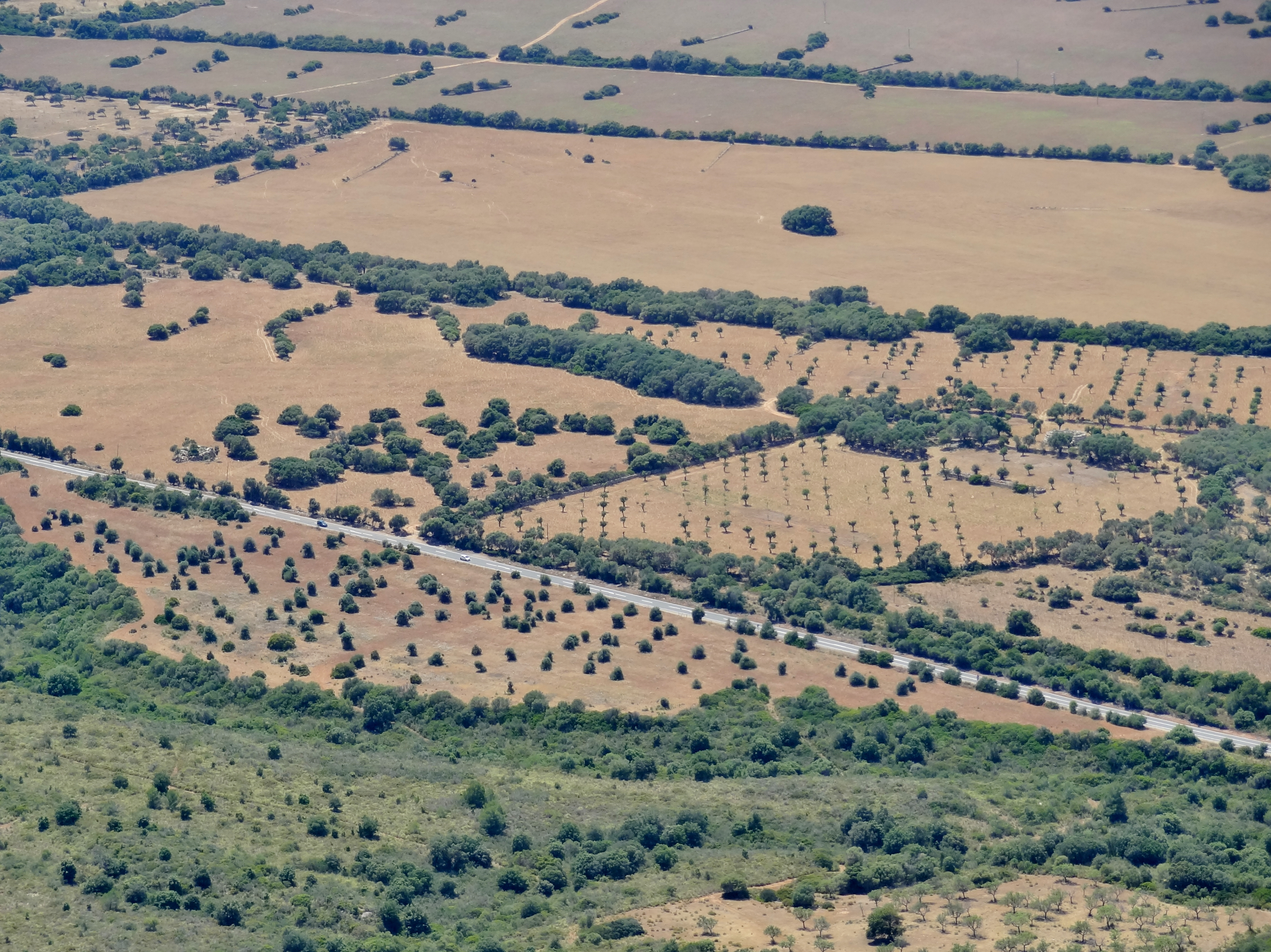 Landgut Sa Canova de Morell mit den Talaiots Sa Clova des Xot und de ses Llenques in der Gemeinde Artà, Mallorca, Spanien